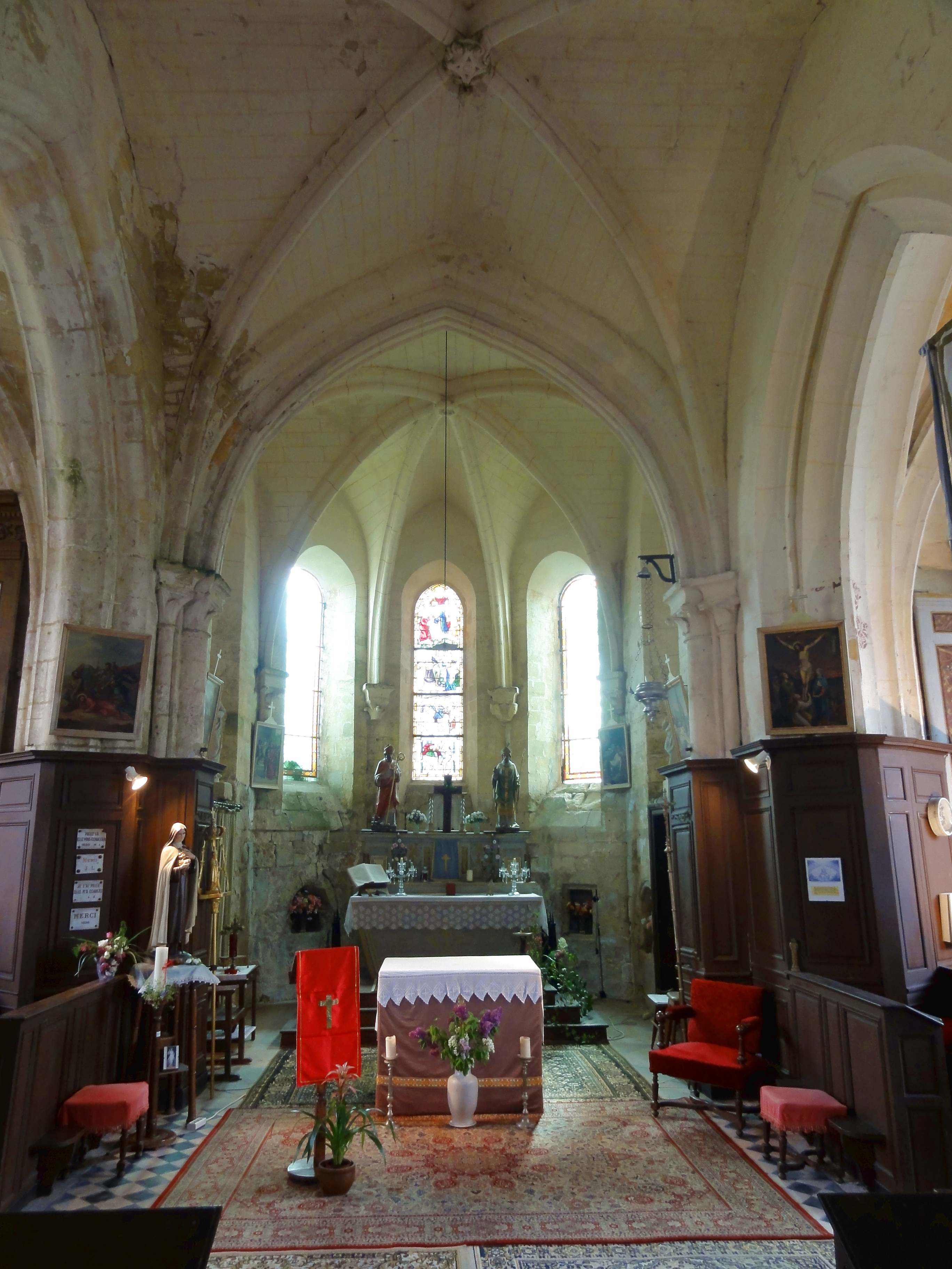 Intérieur de l'église - voir titre.